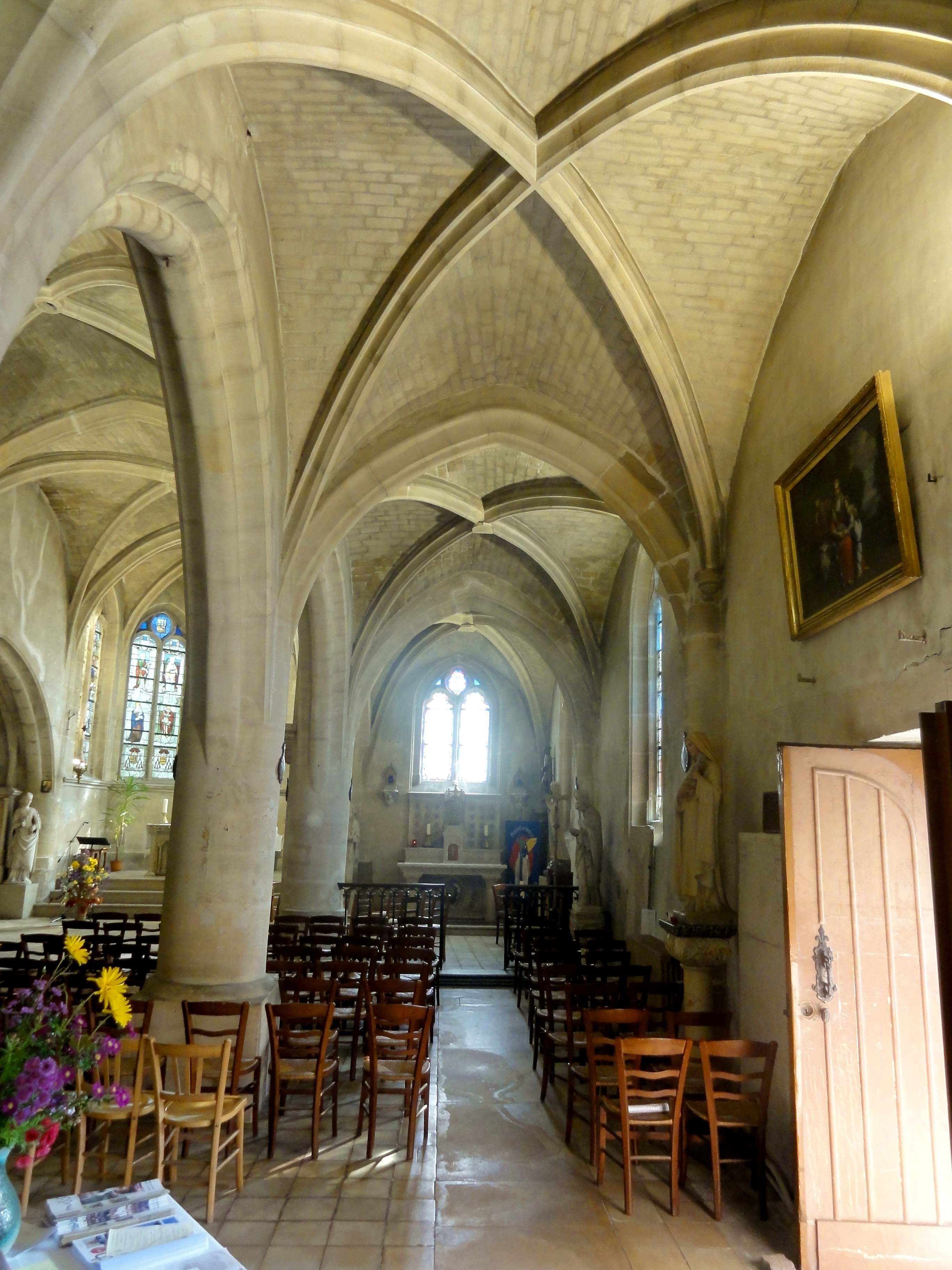 Intérieur de l'église - voir titre.